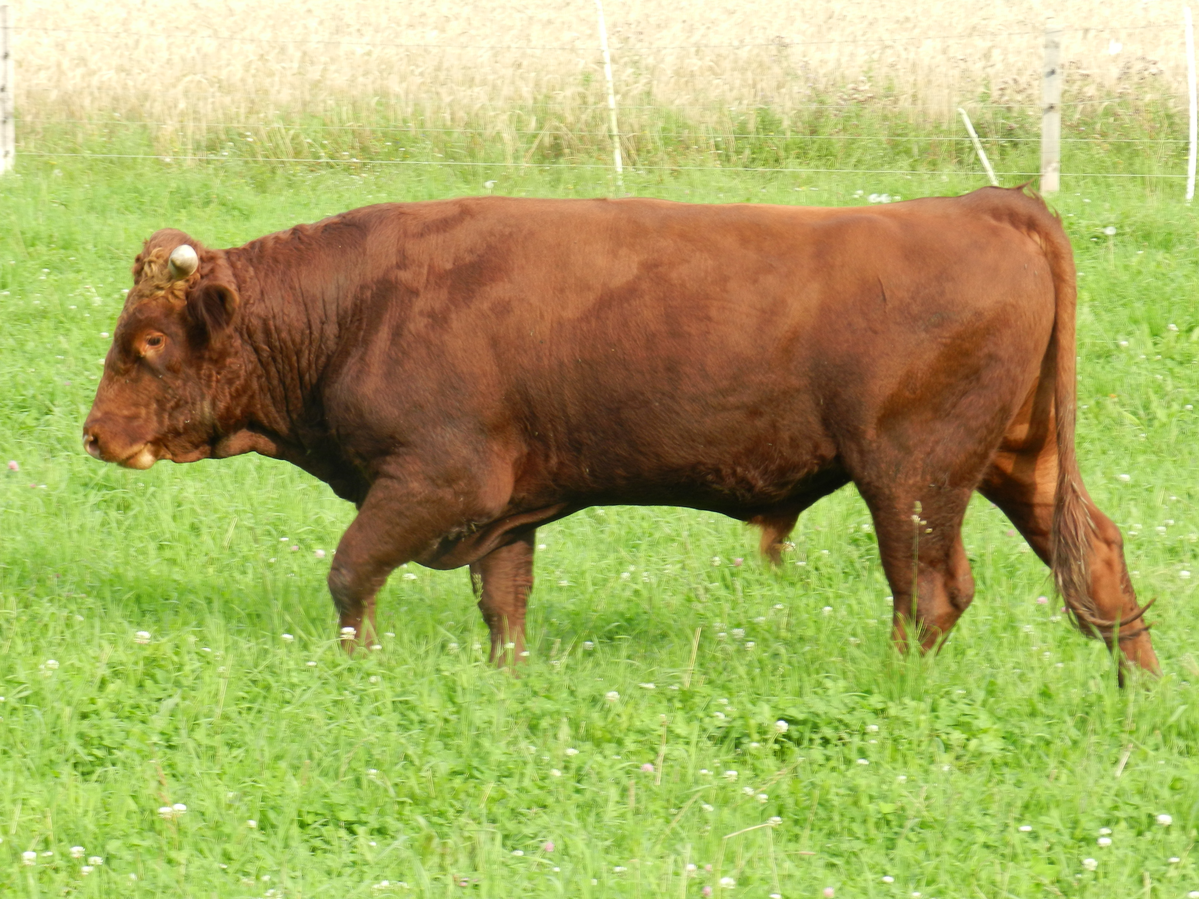 Rotvieh aus Tännesberg (2011)